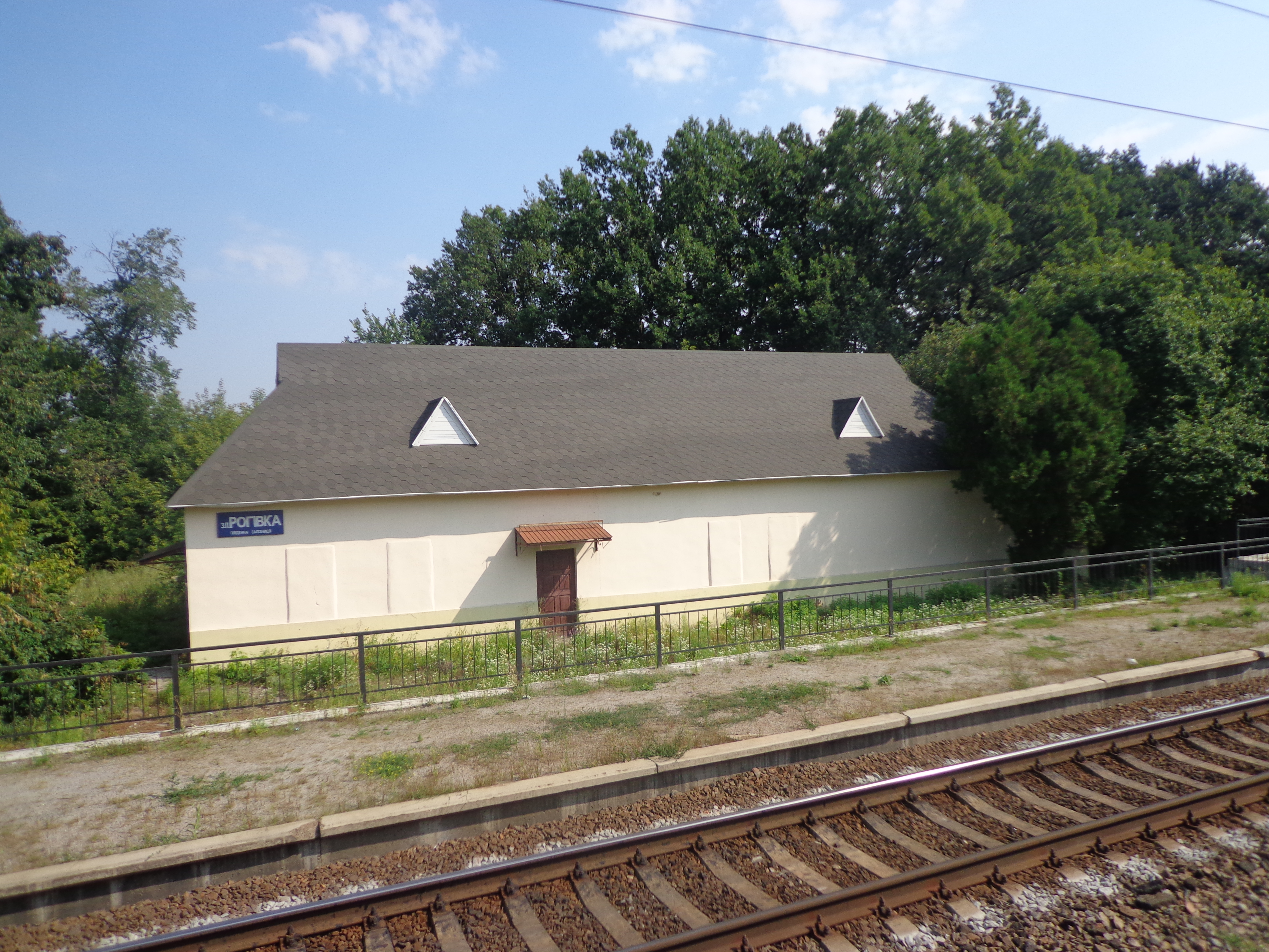 Остановочный пункт Роговка, Харьковская область, ветка Харьков-Полтава